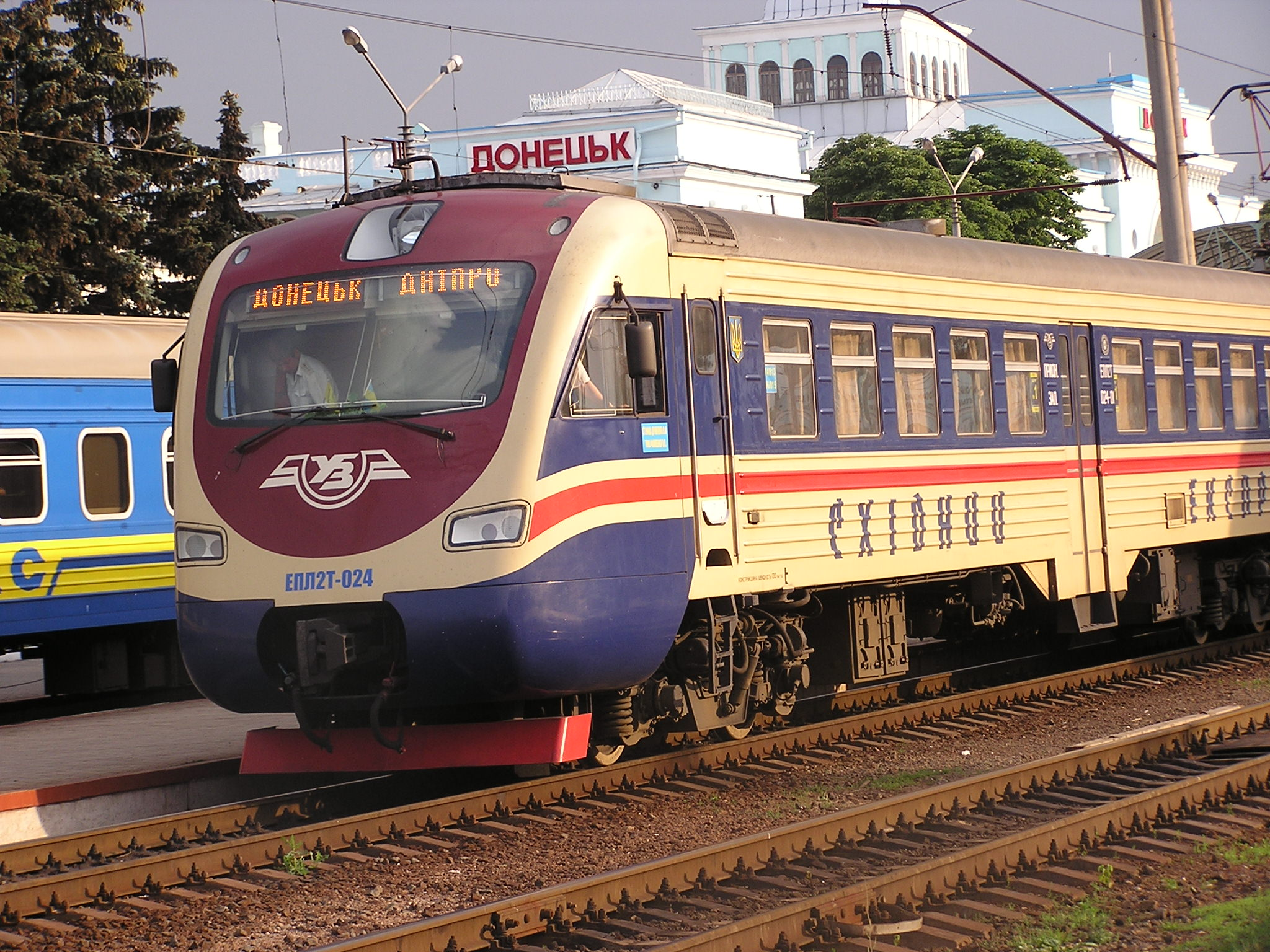 ЖД вокзал в Донецке.